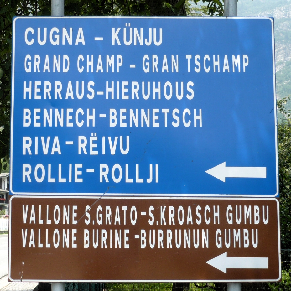 Zweisprachiger Wegweiser in Issime / Eischeme